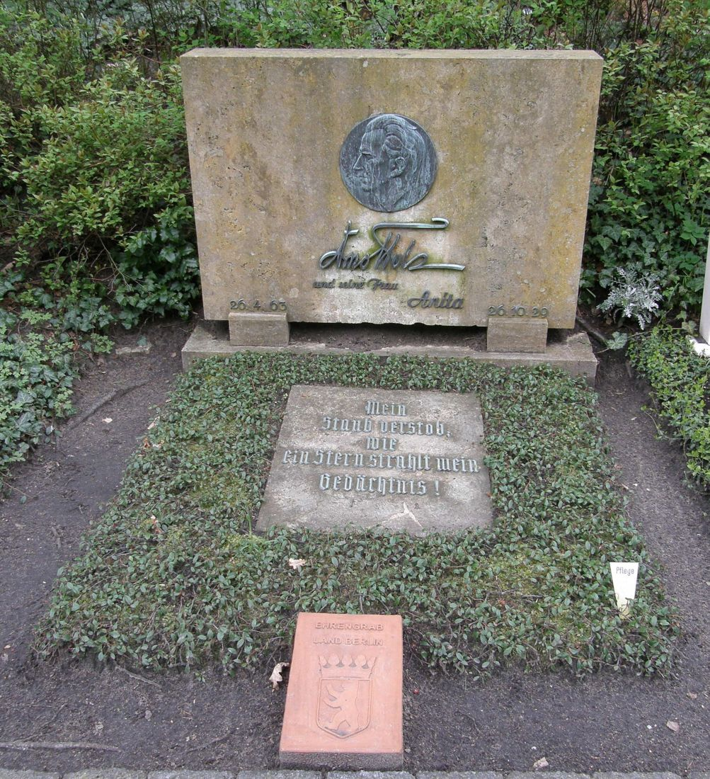 Ehrengrab von Arno Holz auf dem Friedhof Heerstraße. Trakehner Allee 1, Berlin-Westend.